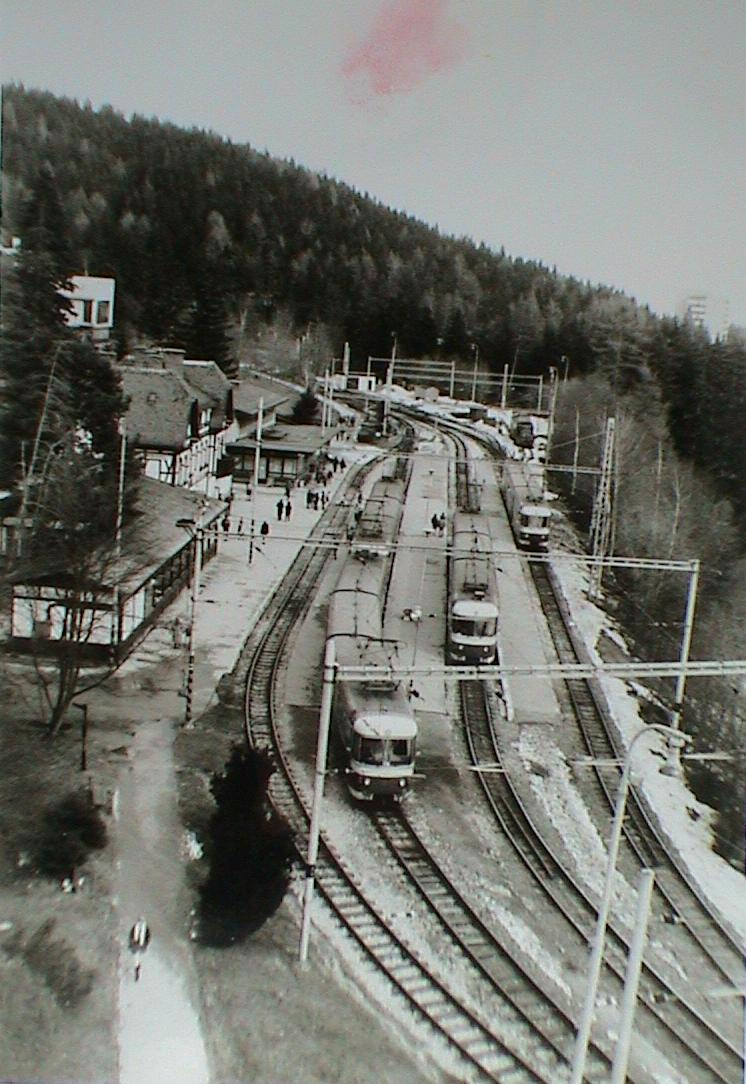 Tatranské elektrické železnice, Nádraží Starý Smokovec